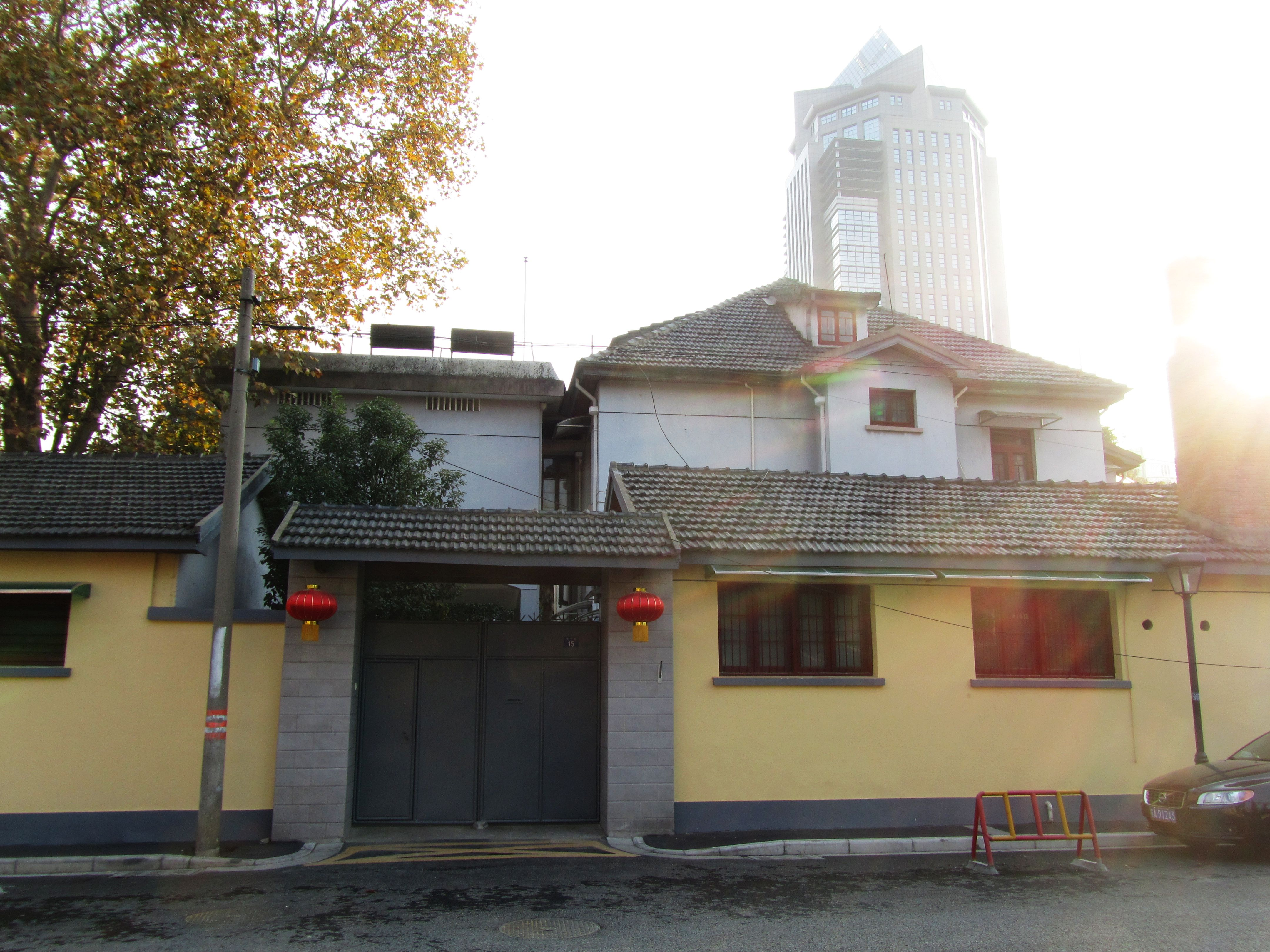 颐和路公馆区——天竺路15号民国建筑，原墨西哥驻华大使馆。